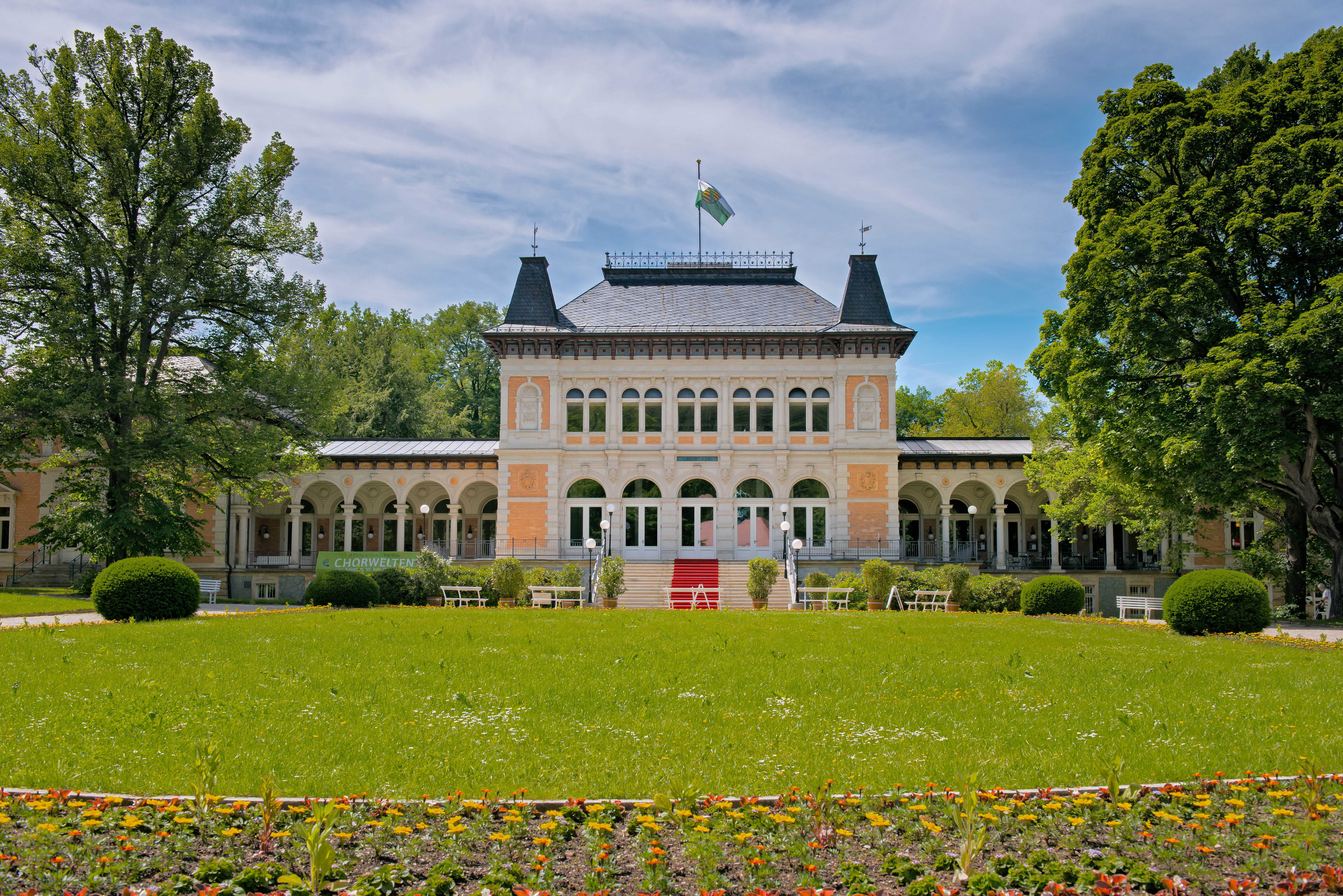 Königliches Kurhaus Bad Elster